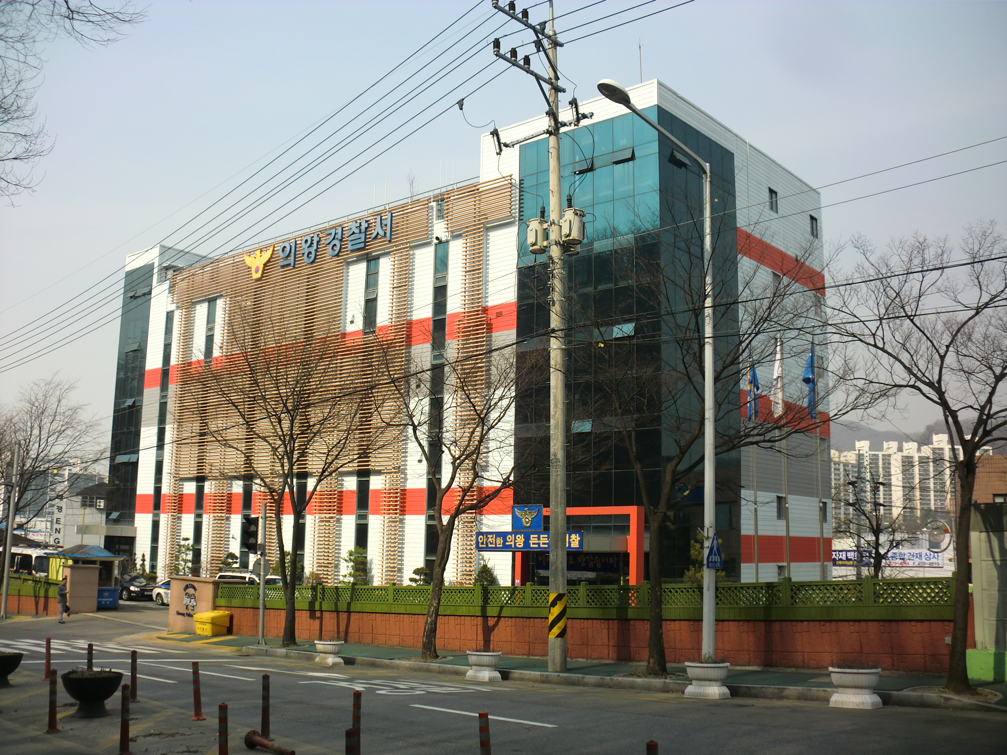 경기도 의왕시에 있는 의왕경찰서